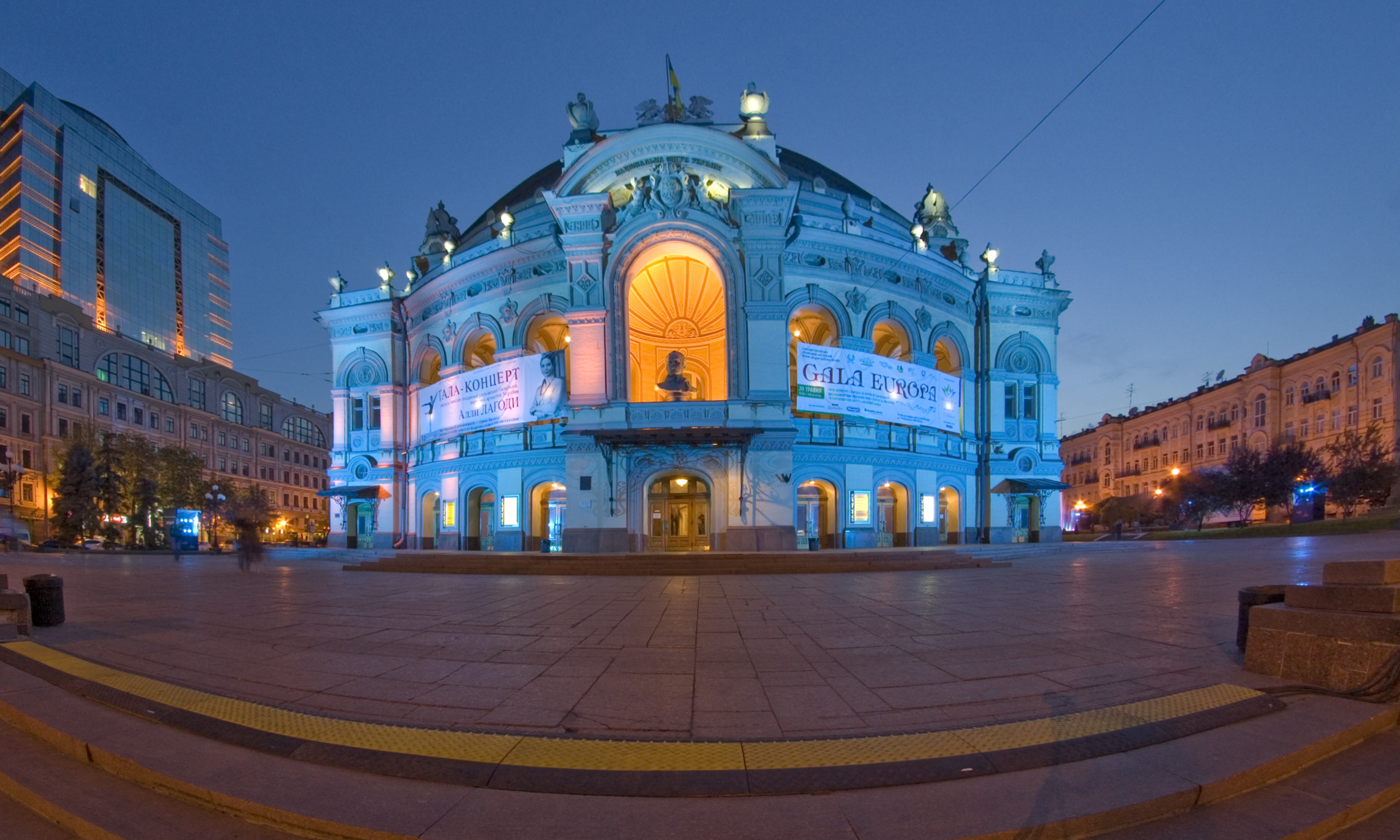 Театр опери балету ім. Т. Г. Шевченка, Київ, вул. Володимирська, 50